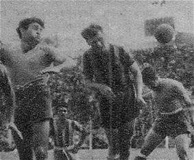 Gol convertido por Alejandro Mur en la victoria de Rosario Central ante Boca Jrs. el 25 de septiembre de 1949, por 2 a 0.